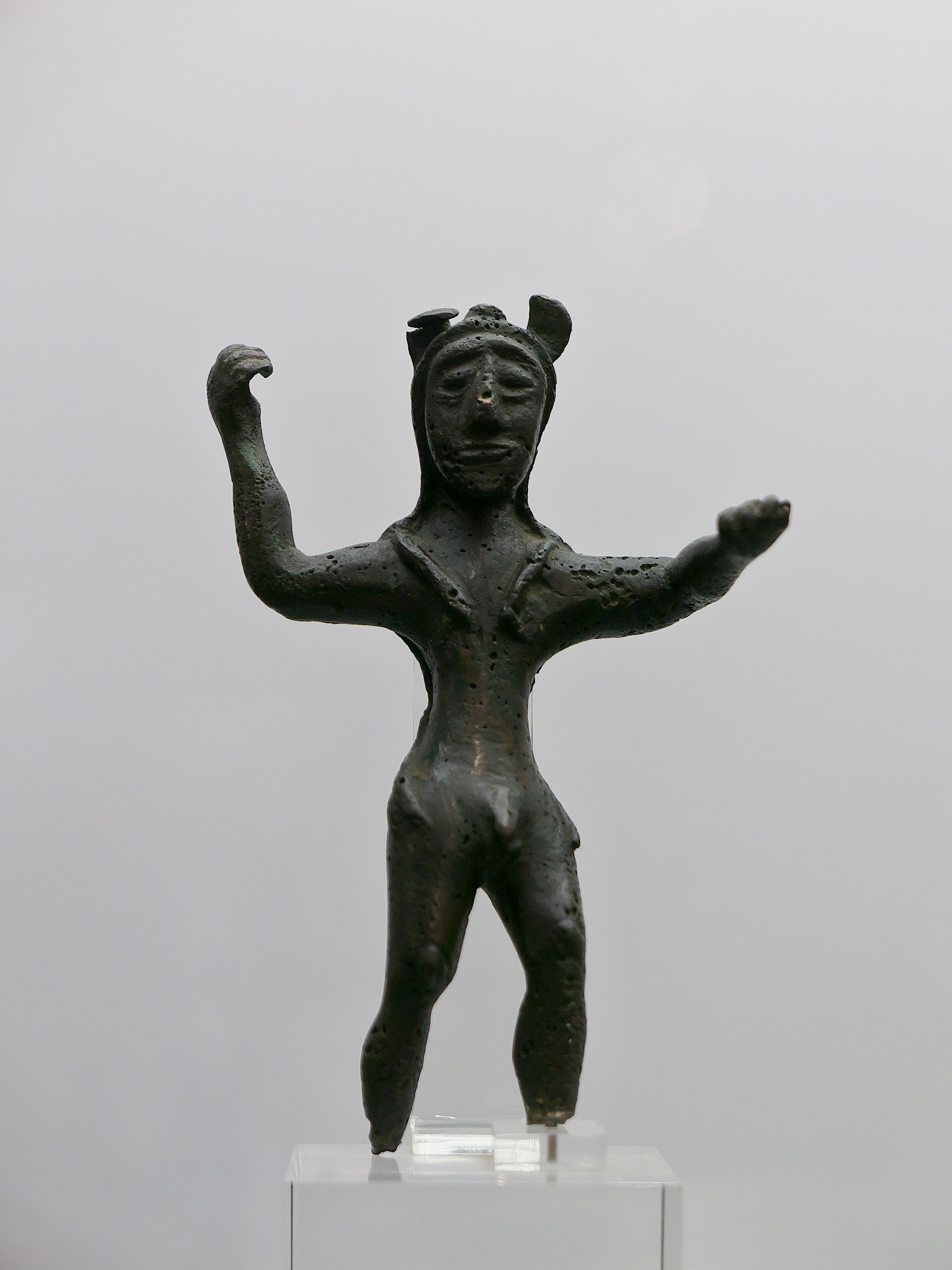 Estatuilla de bronce de Melkart, perteneciente a la cultura tartésica (s. VI a.C.)